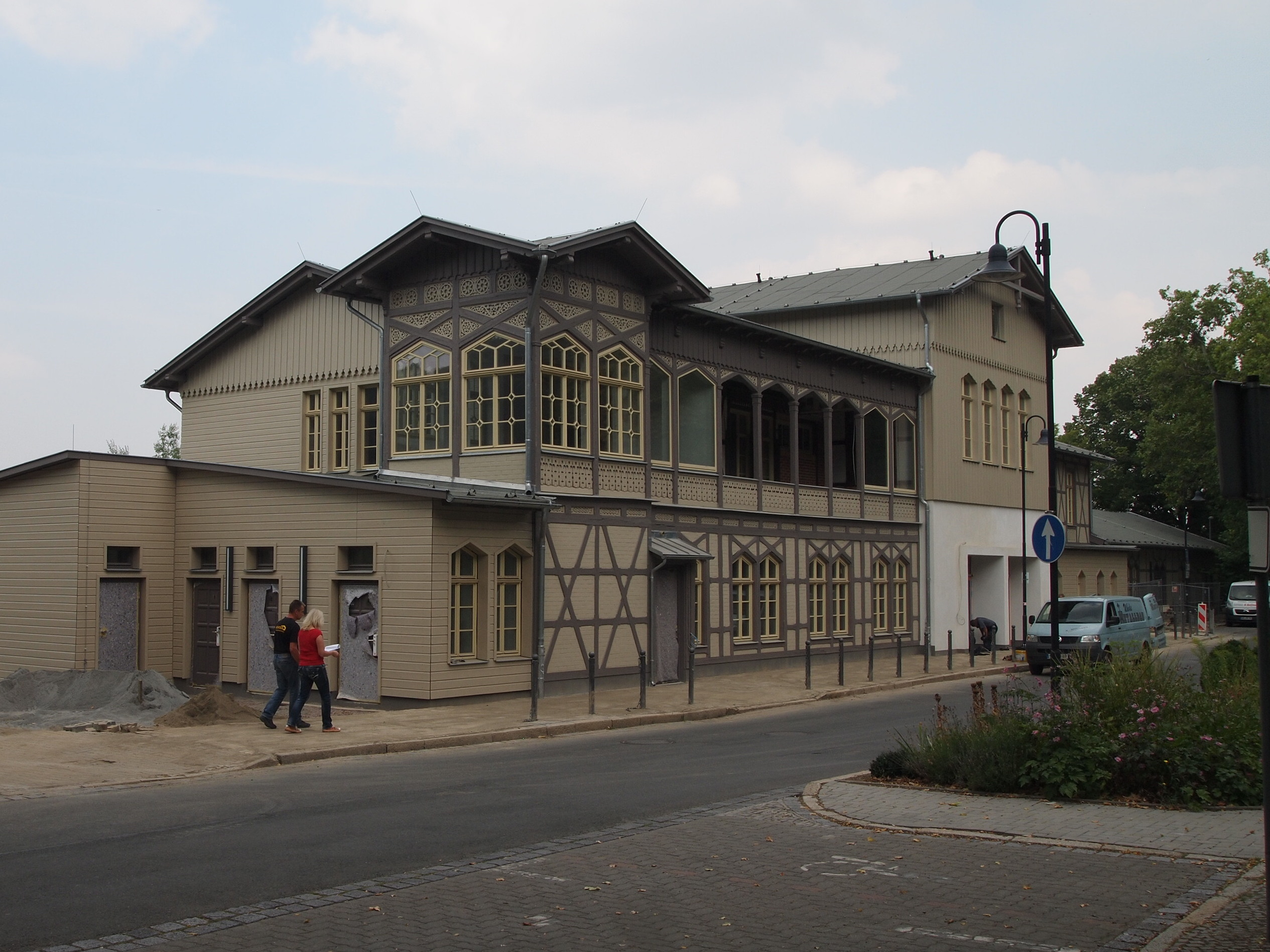 Thale, Landkreis Harz, Sachsen-Anhalt; Hauptbahnhofsgebäude